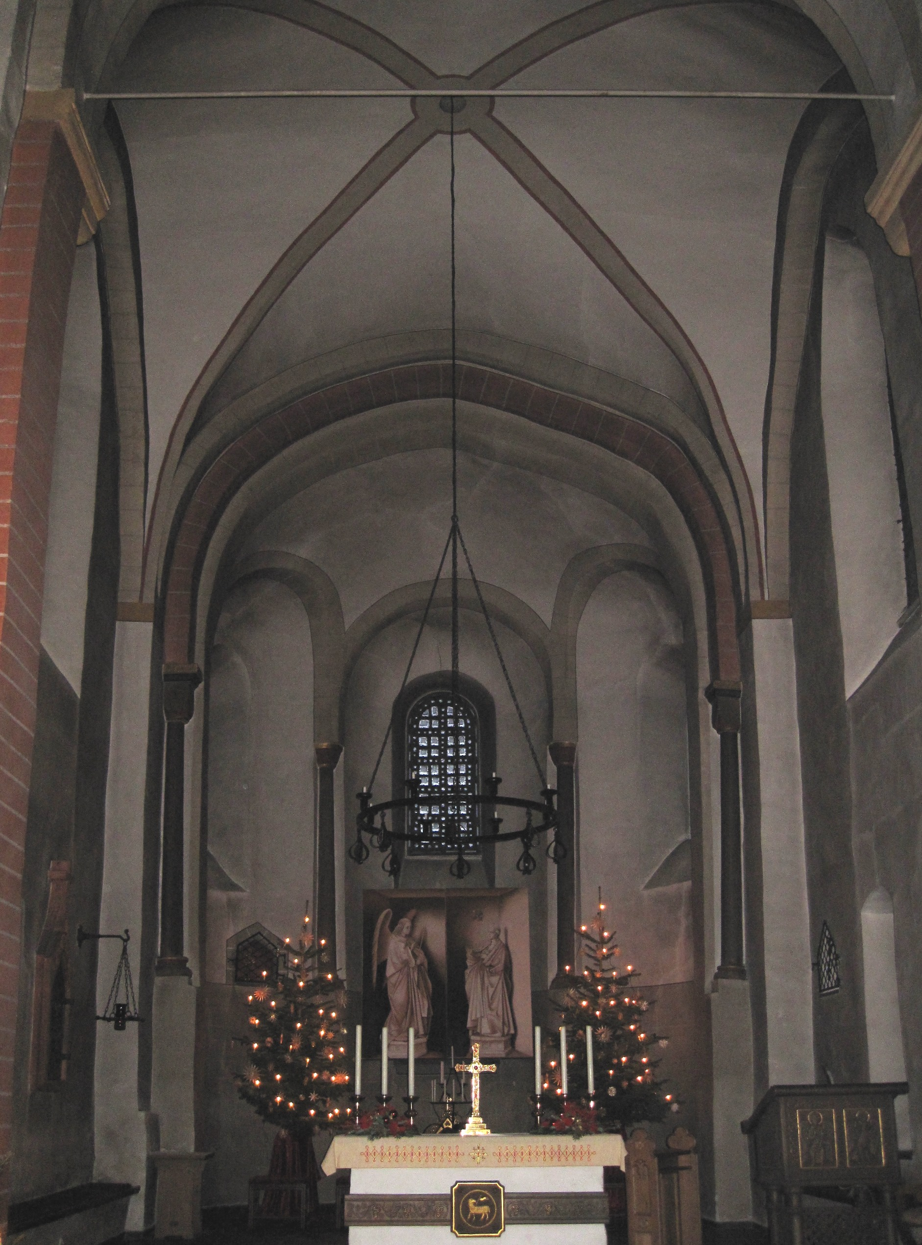 Katholische Kirche St. Clemens (alter Teil) in Drolshagen, Kirchplatz 3.